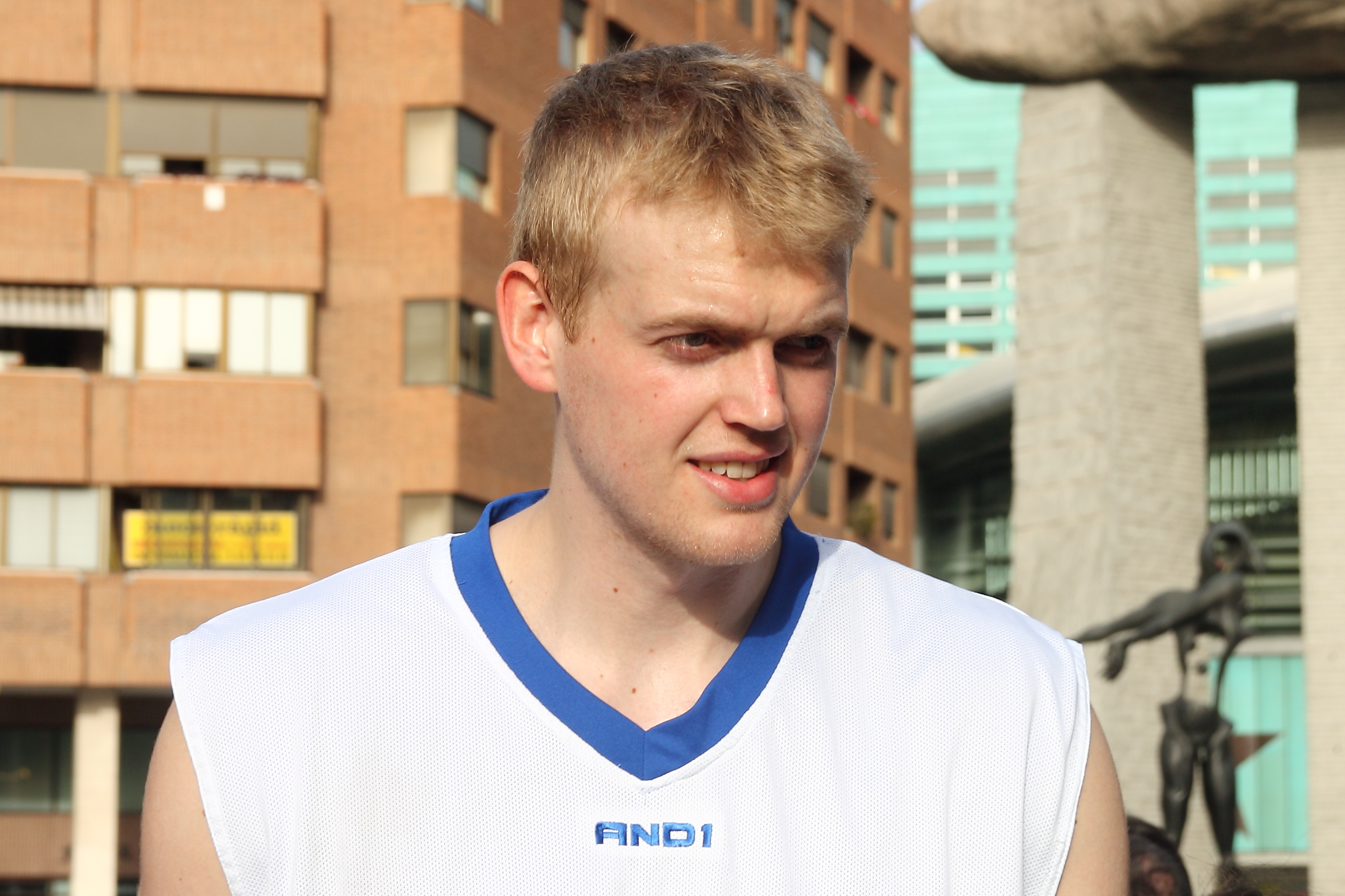 Daniel Clark. Jugador del Club Baloncesto Estudiantes, Madrid.